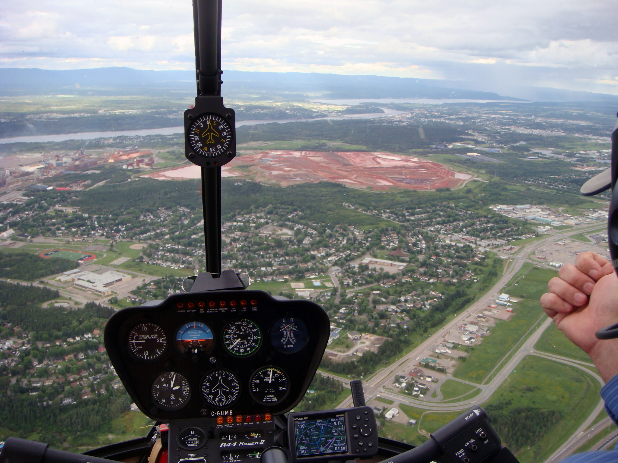 Vue aérienne des boues rouges d'Arvida.